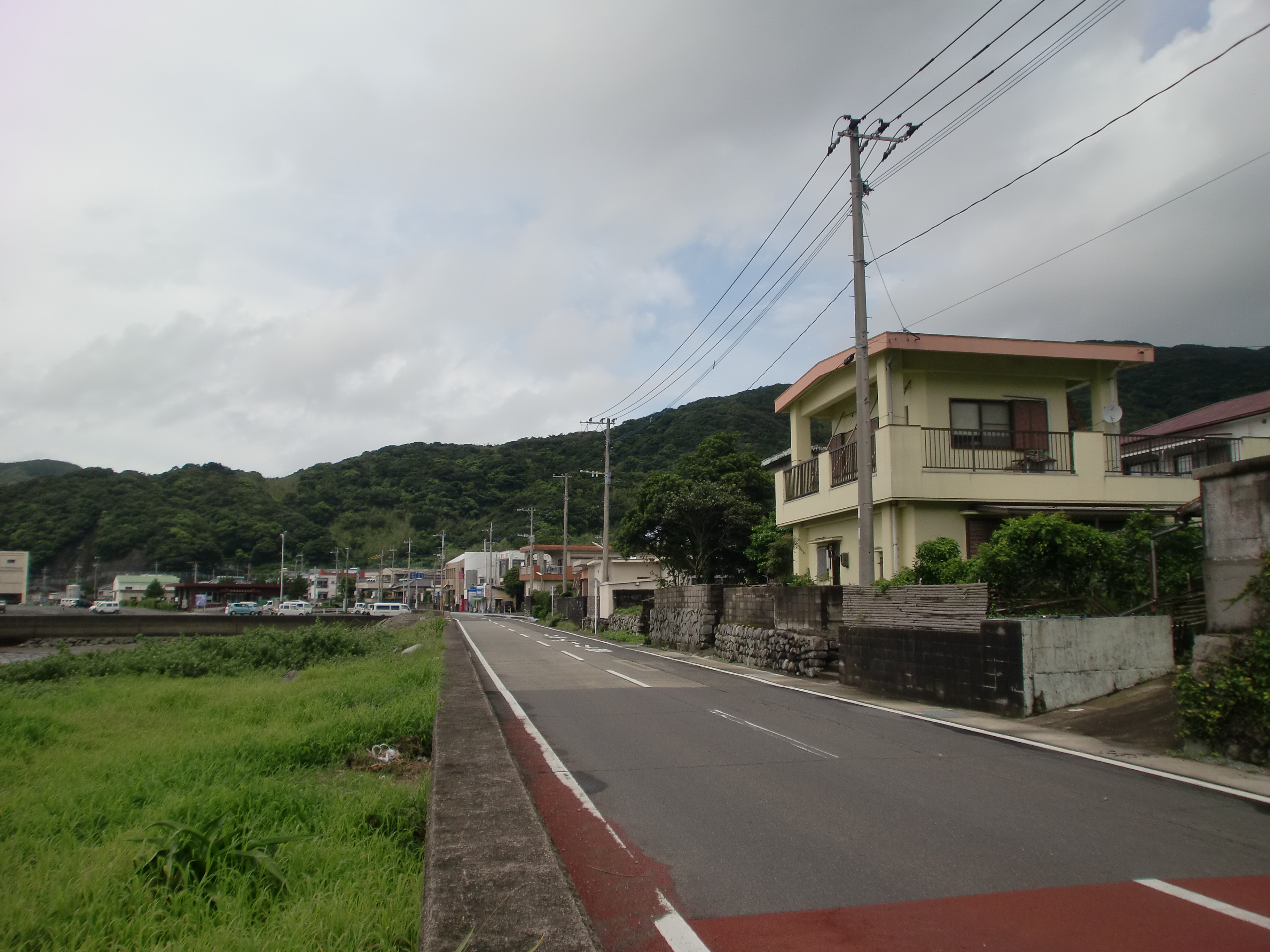 鹿児島県道348号桑之浦里港線を中甑港から起点方向を望む